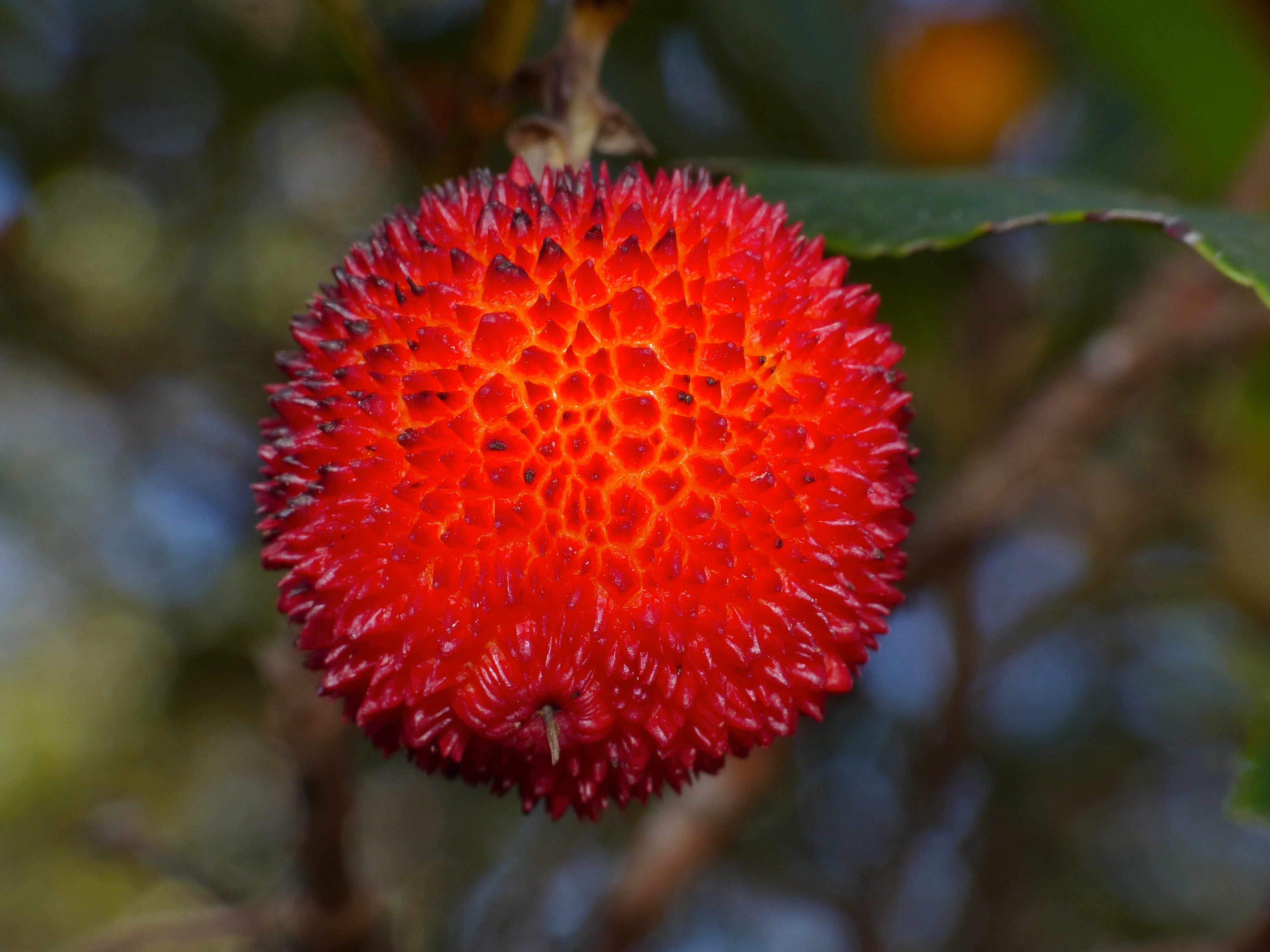 Valcrose, Aniane, Hérault, FRANCE